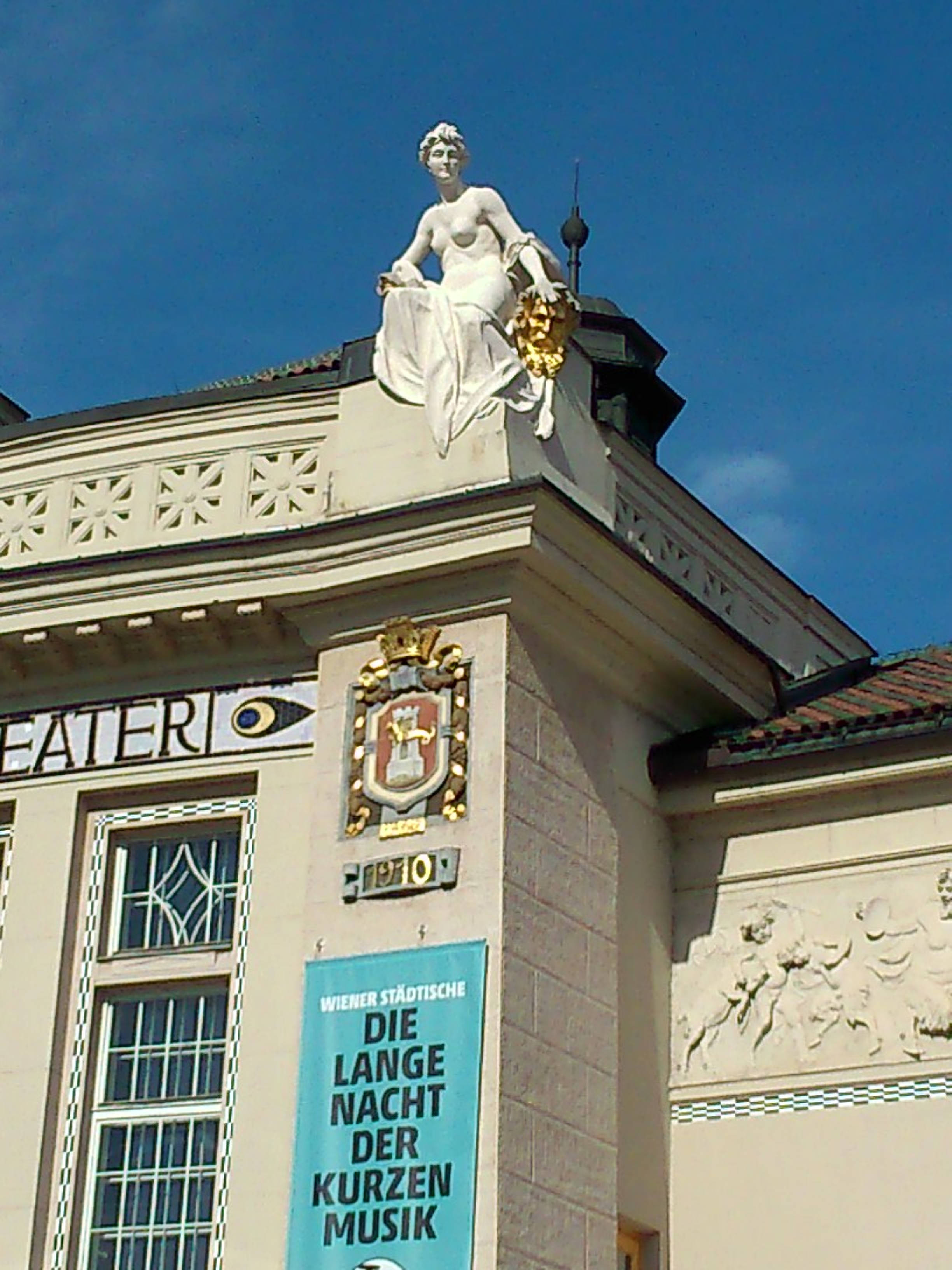 Jubiläums-Stadttheater